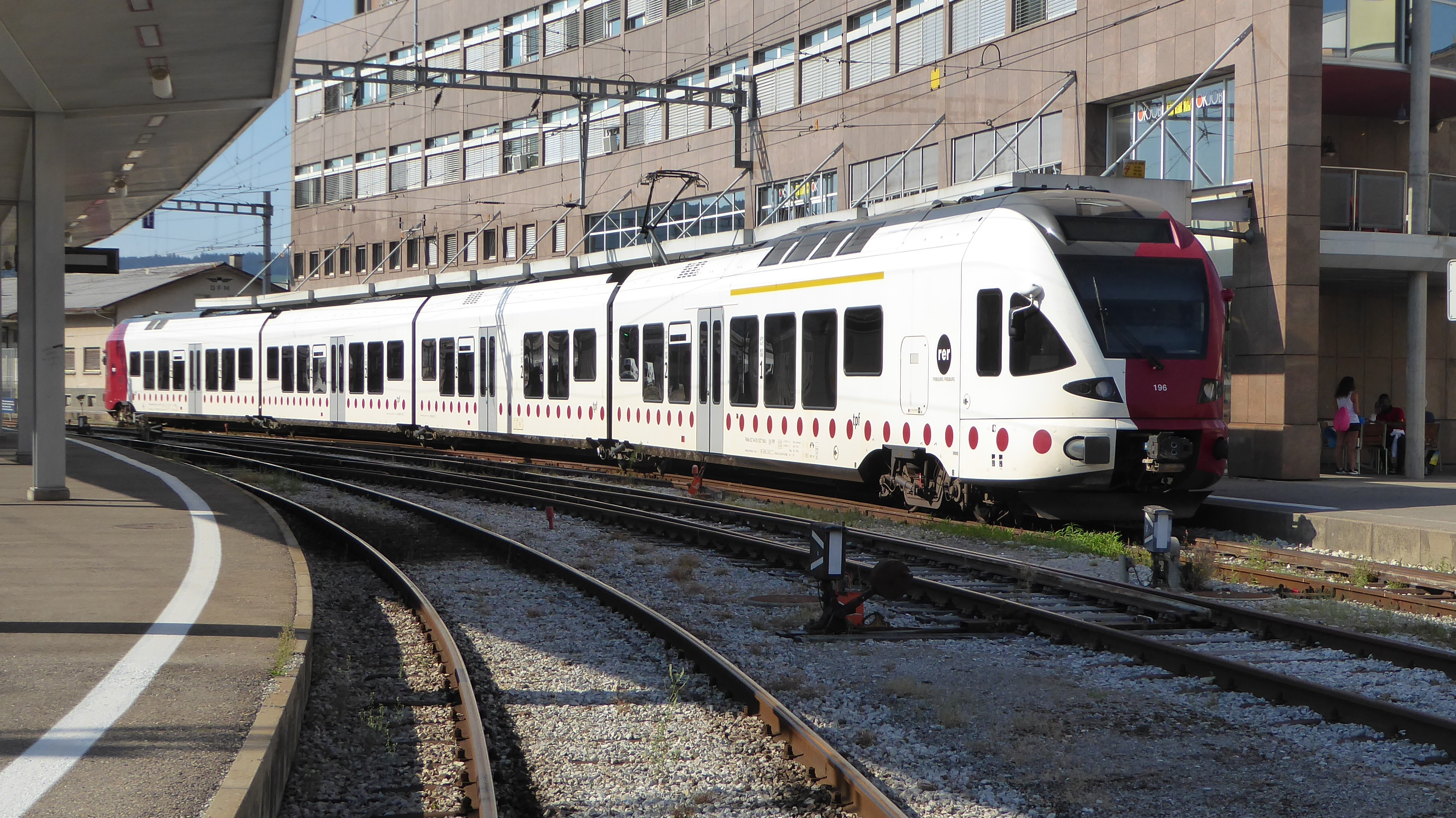 TPF Flirt in Bulle vor der Abfahrt als Regioexpress nach Fribourg